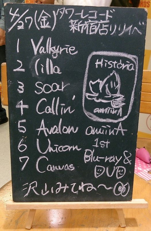 amiinAセトリボード(20180427(1))